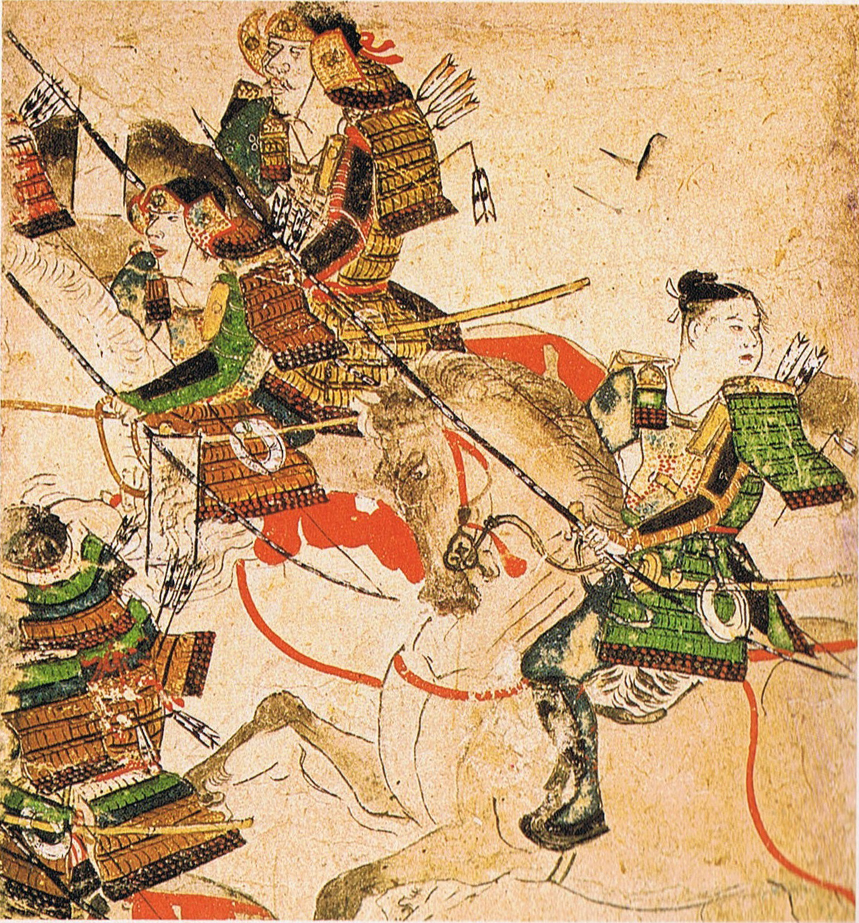 『平治物語』 敗走する源義朝一行。右の子供は頼朝。